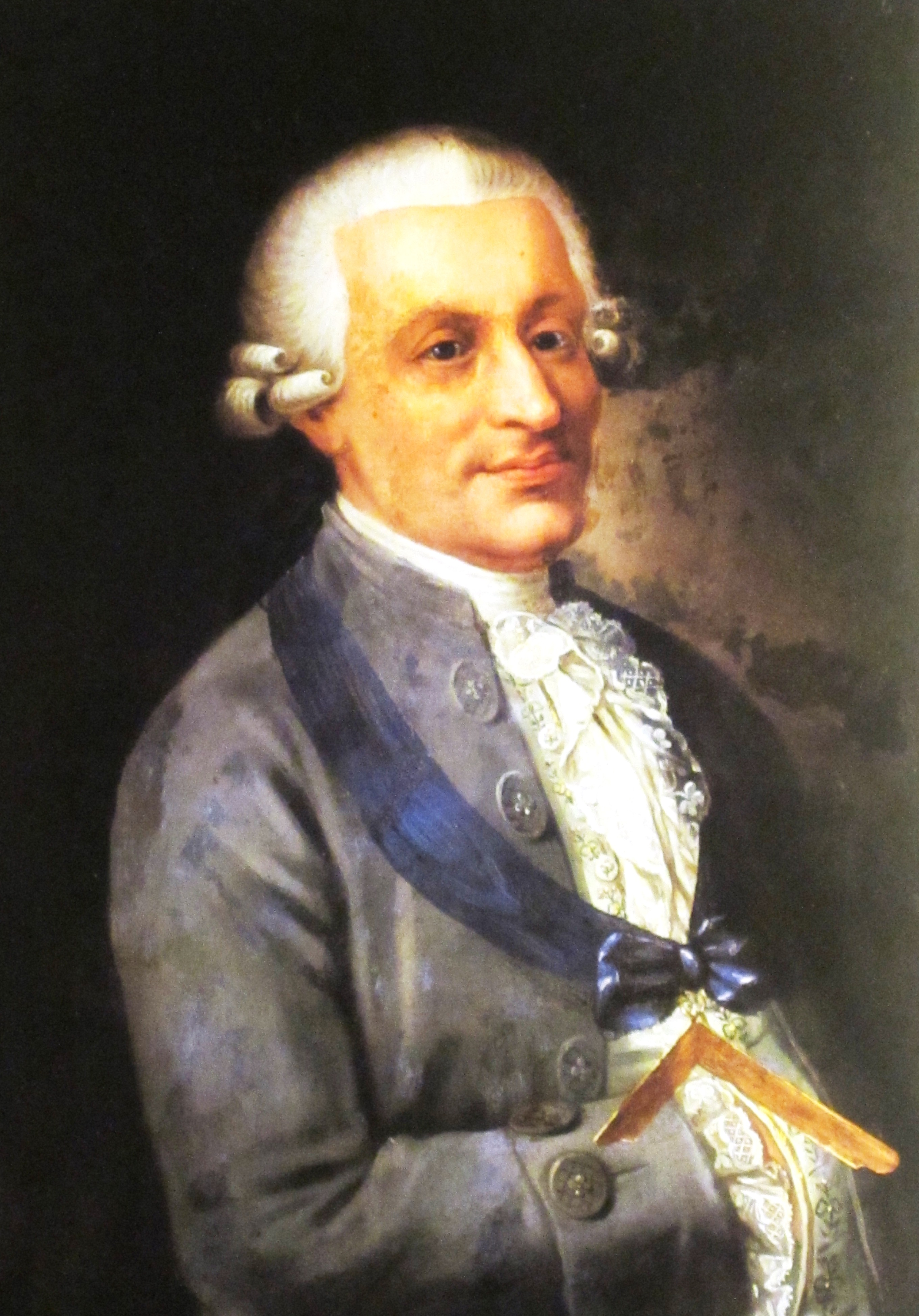 Bildnis Johann Carl Dähnert (1719-1785)